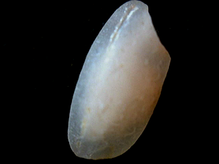 Uma foto aproximada (macro) de um grão de arroz arbório quebrado.